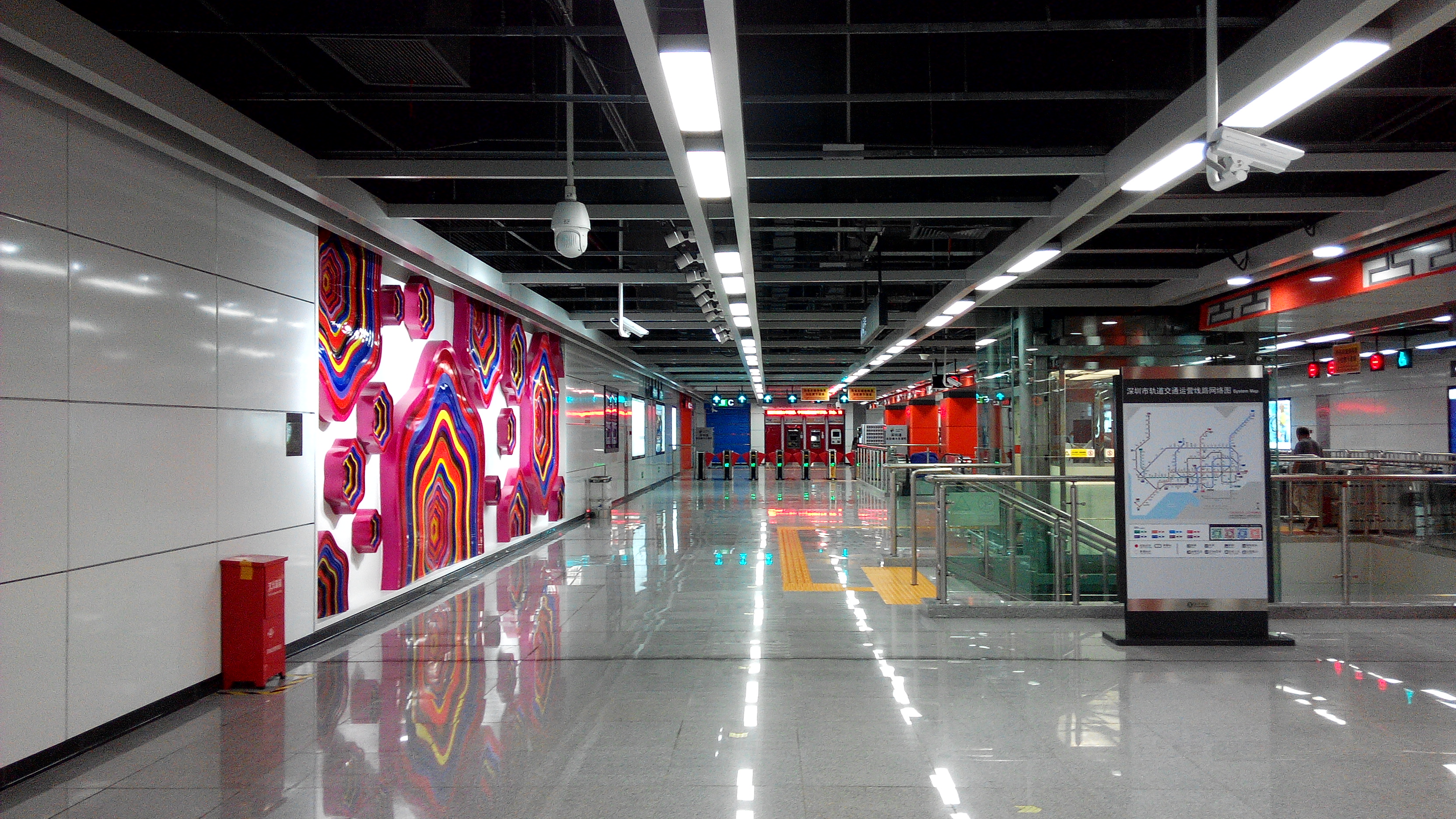 深圳地铁9号线 梅景站大堂